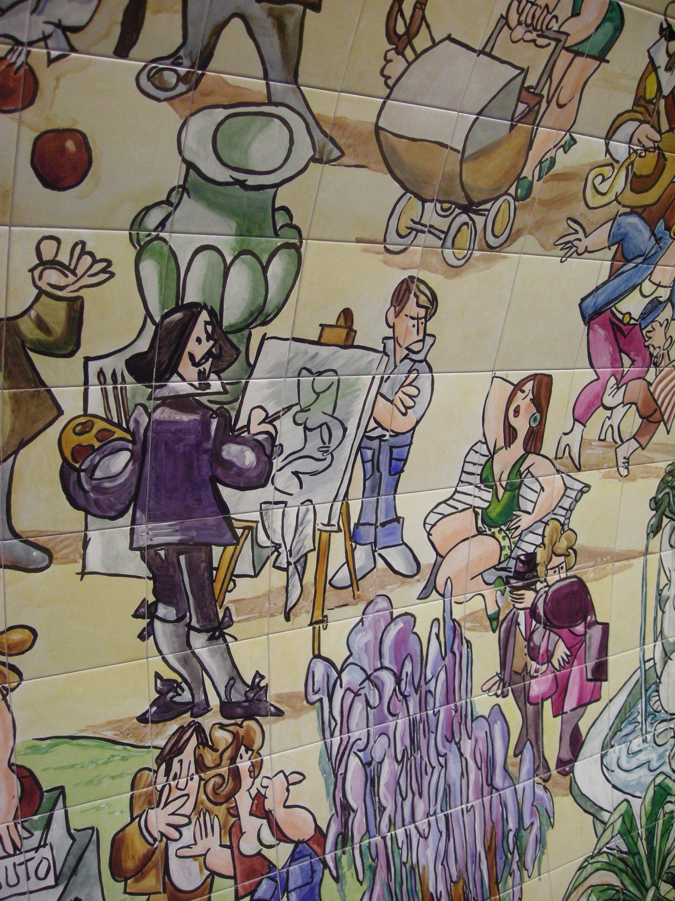 Mural de Antonio Mingote; Estación de Metro de Retiro, Madrid, España.